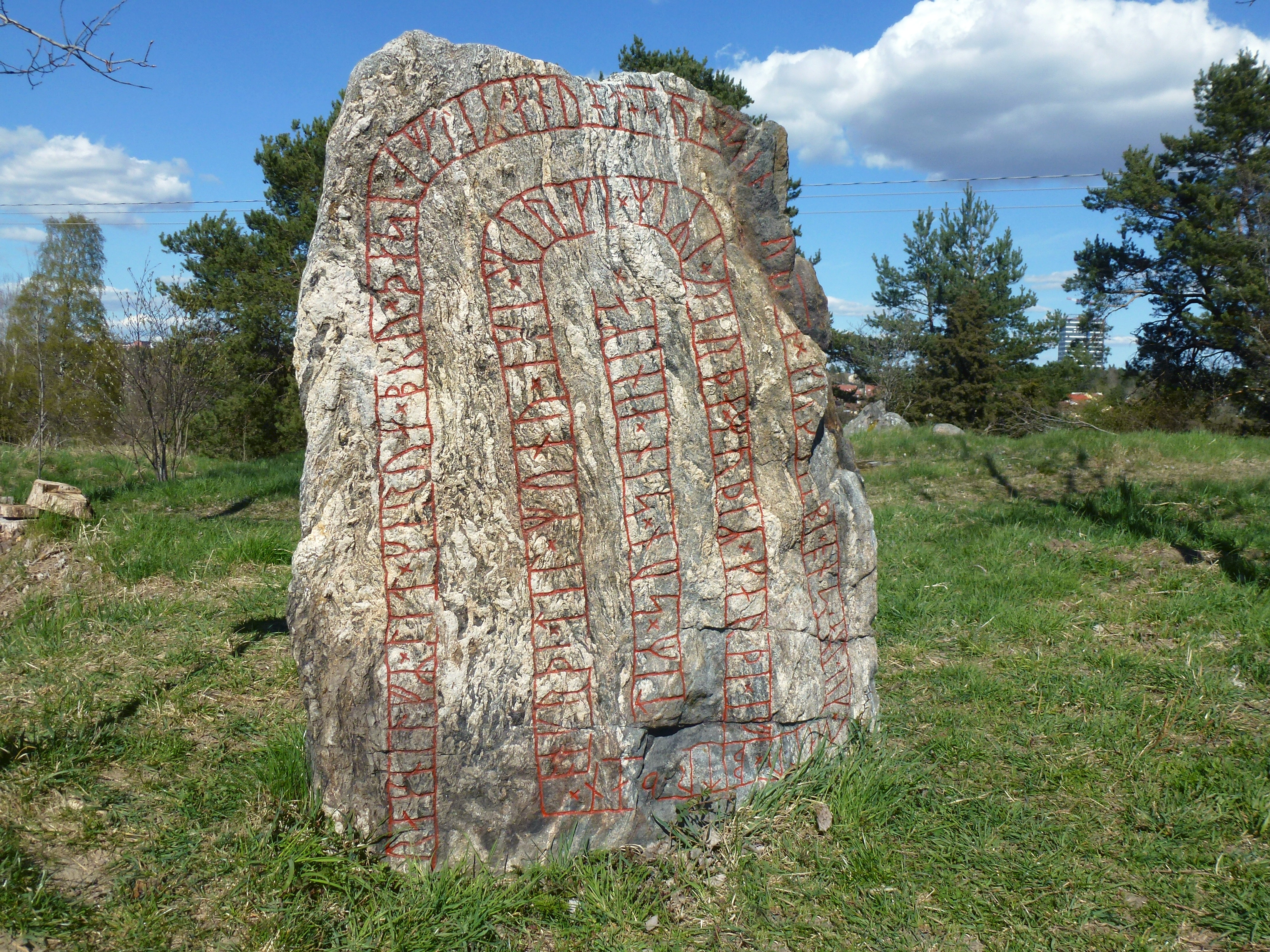 Upplands runinskrifter 69, framsida